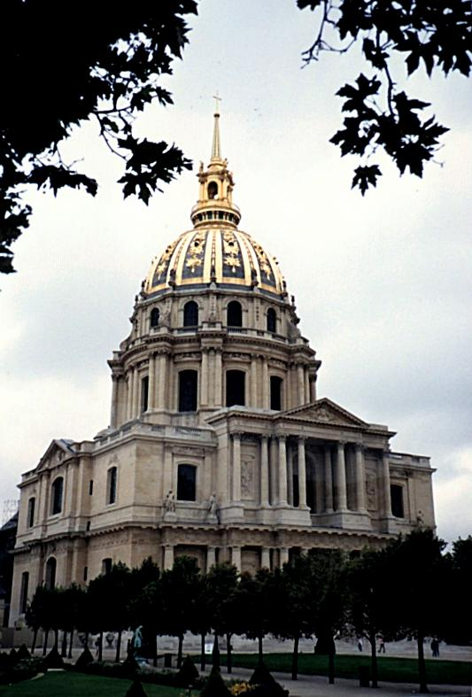 Invalides Paris巴黎拿破仑墓